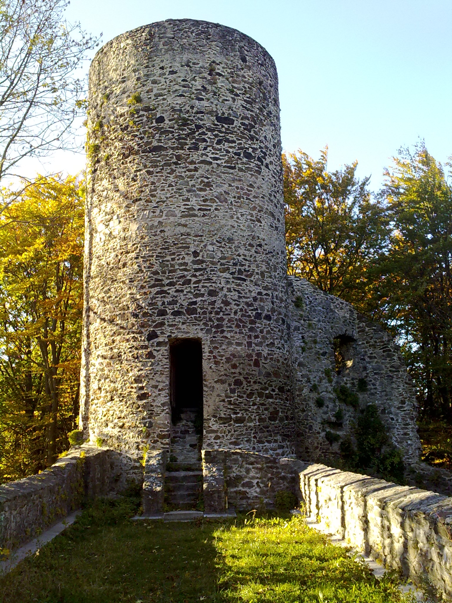 Burgruine Lichtenegg bei Rimbach / Bayerischer Wald